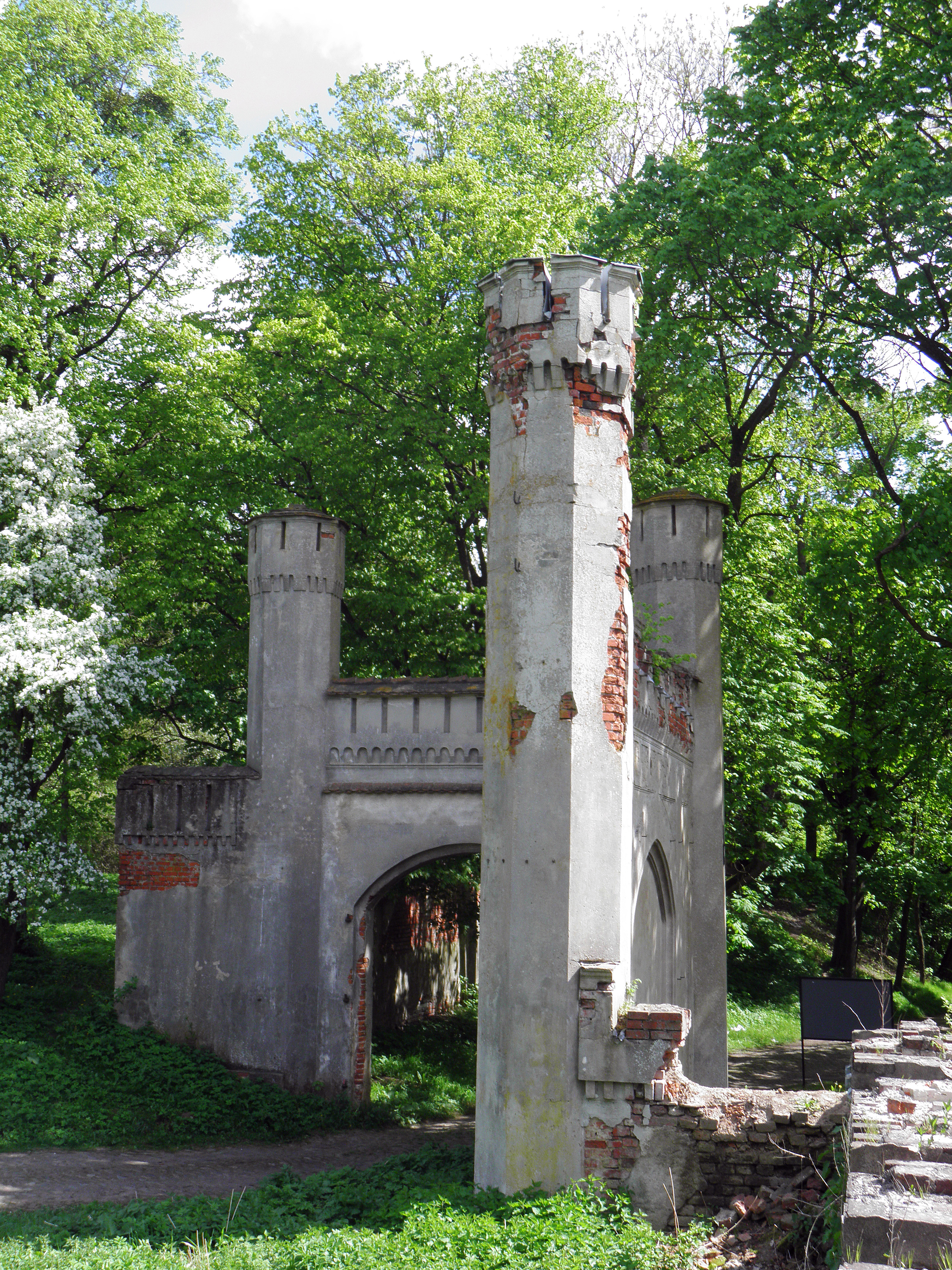 Руины замка «Гердауэн» (Калиниградская область, Правдинск, посёлок железнодорожный, черняховского улица, 27)